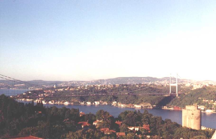 Fatih Sultan Mehmet Köprüsü